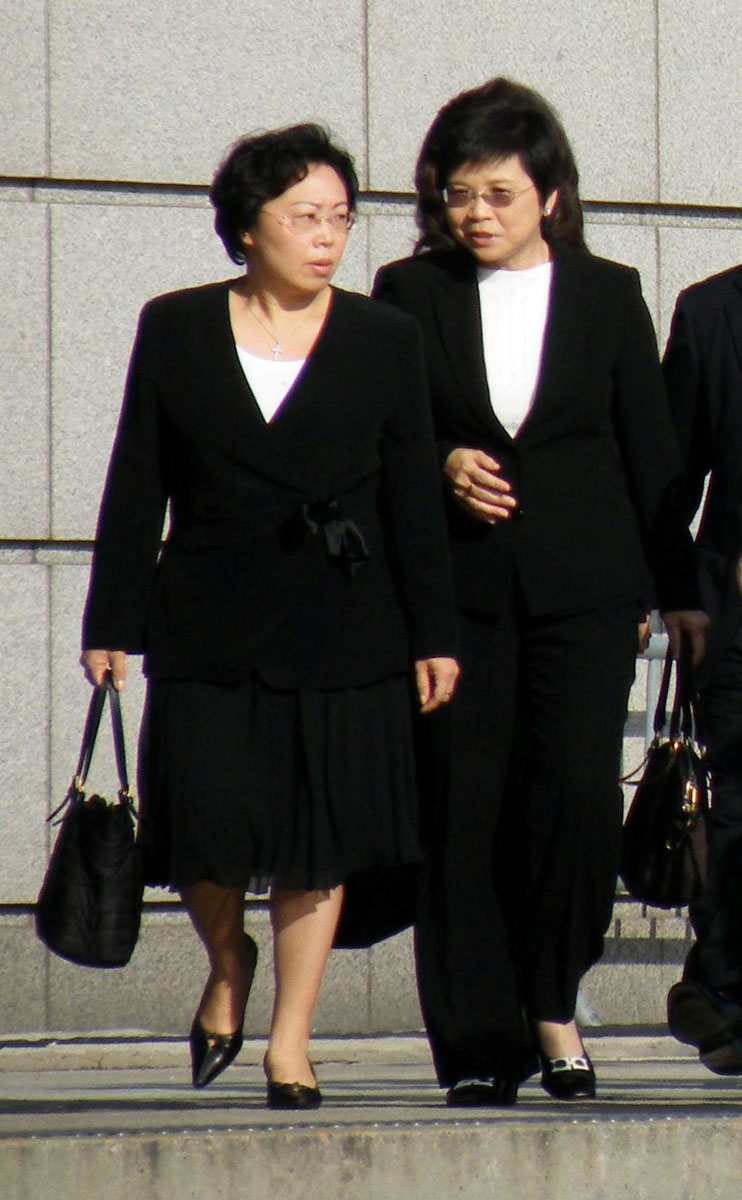 Eva Cheng & Rita Lau